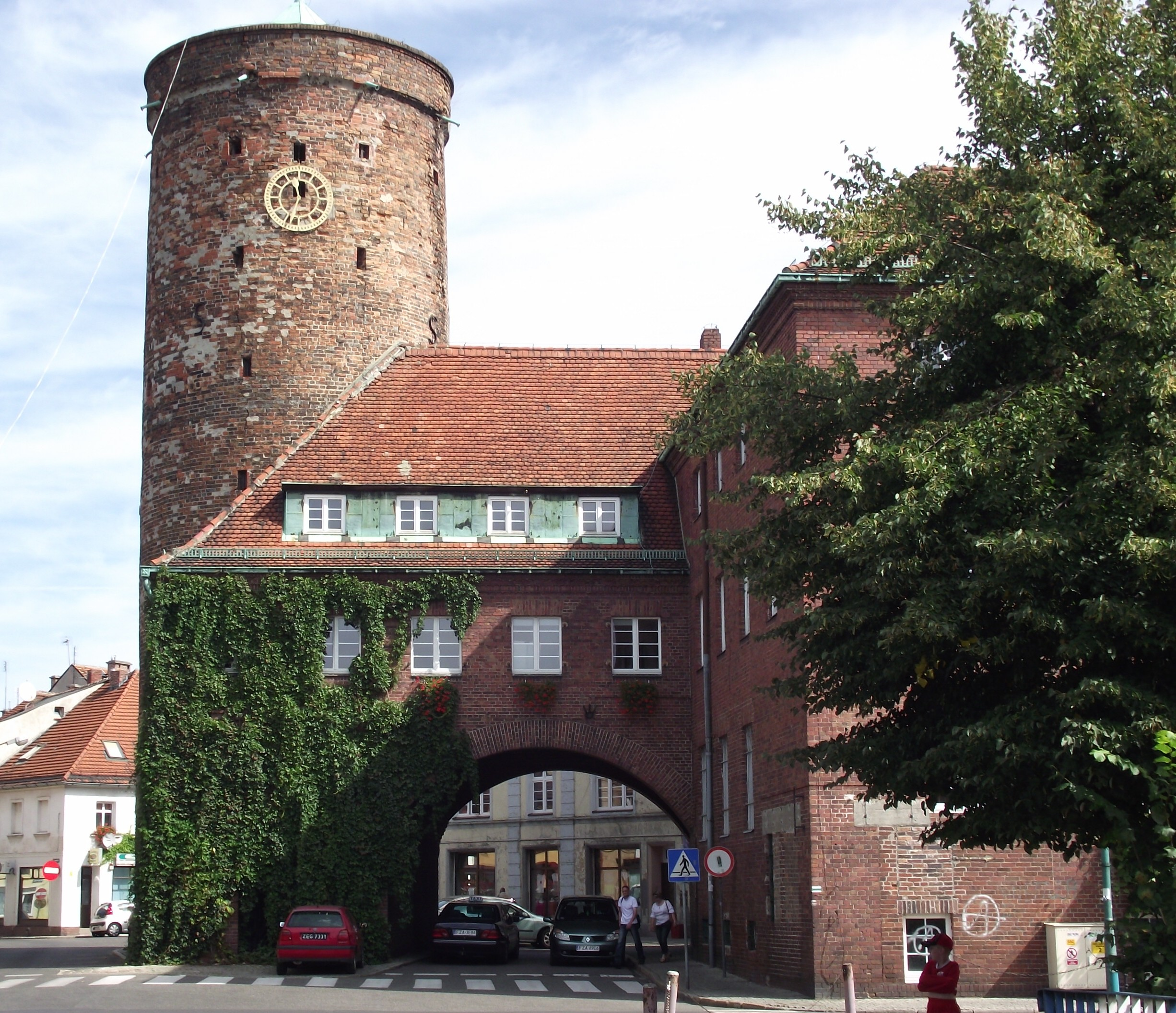 baszta „Wieża Głodowa”, XIV/XV, 1935 Lubsko, ul. Popławskiego, Lubsko 05.1961.